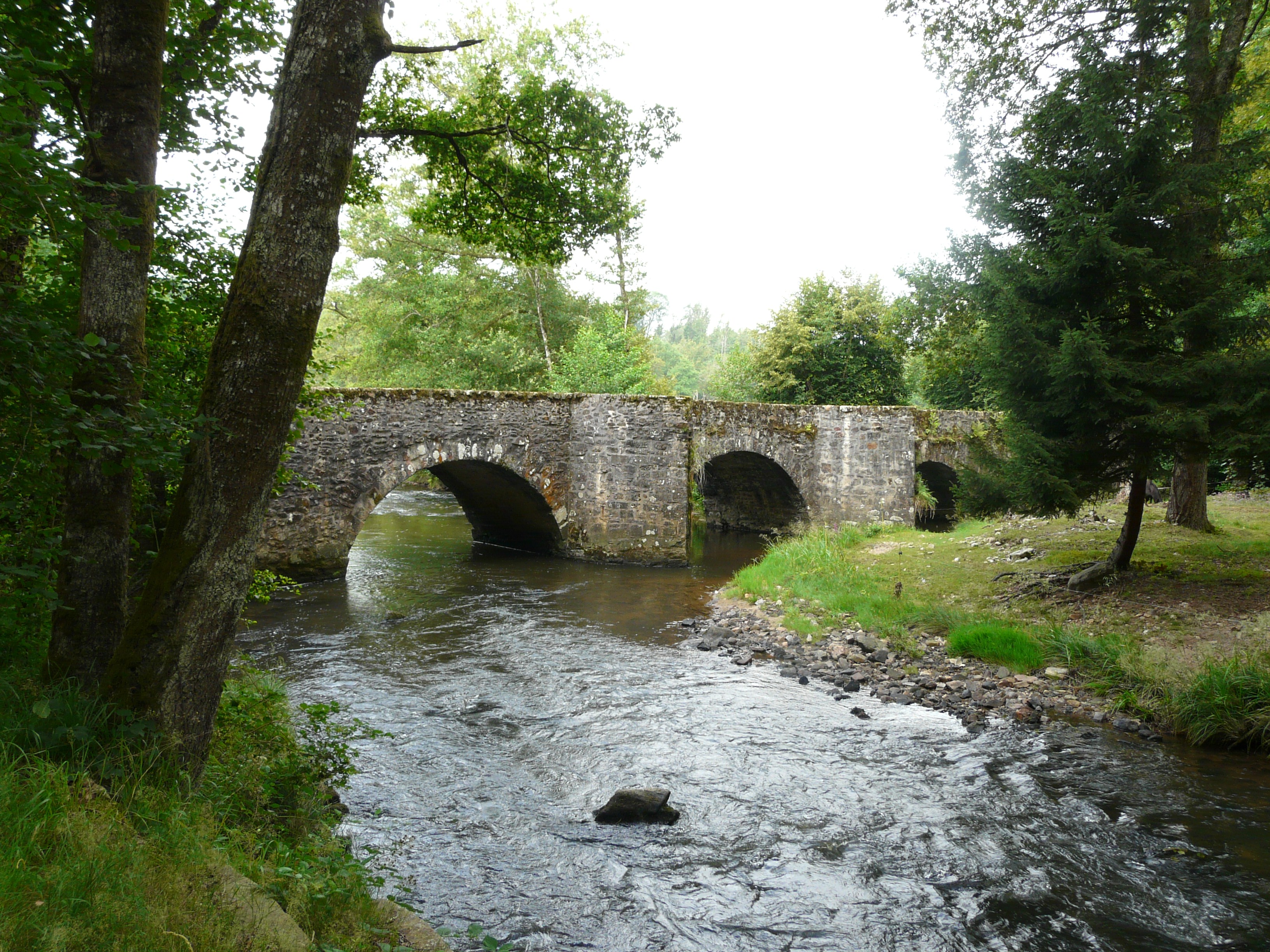 Côté amont, le pont de la Tour sur l'Isle, en limites du Chalard, de Jumilhac-le-Grand et de Saint-Yrieix-la-Perche, France.